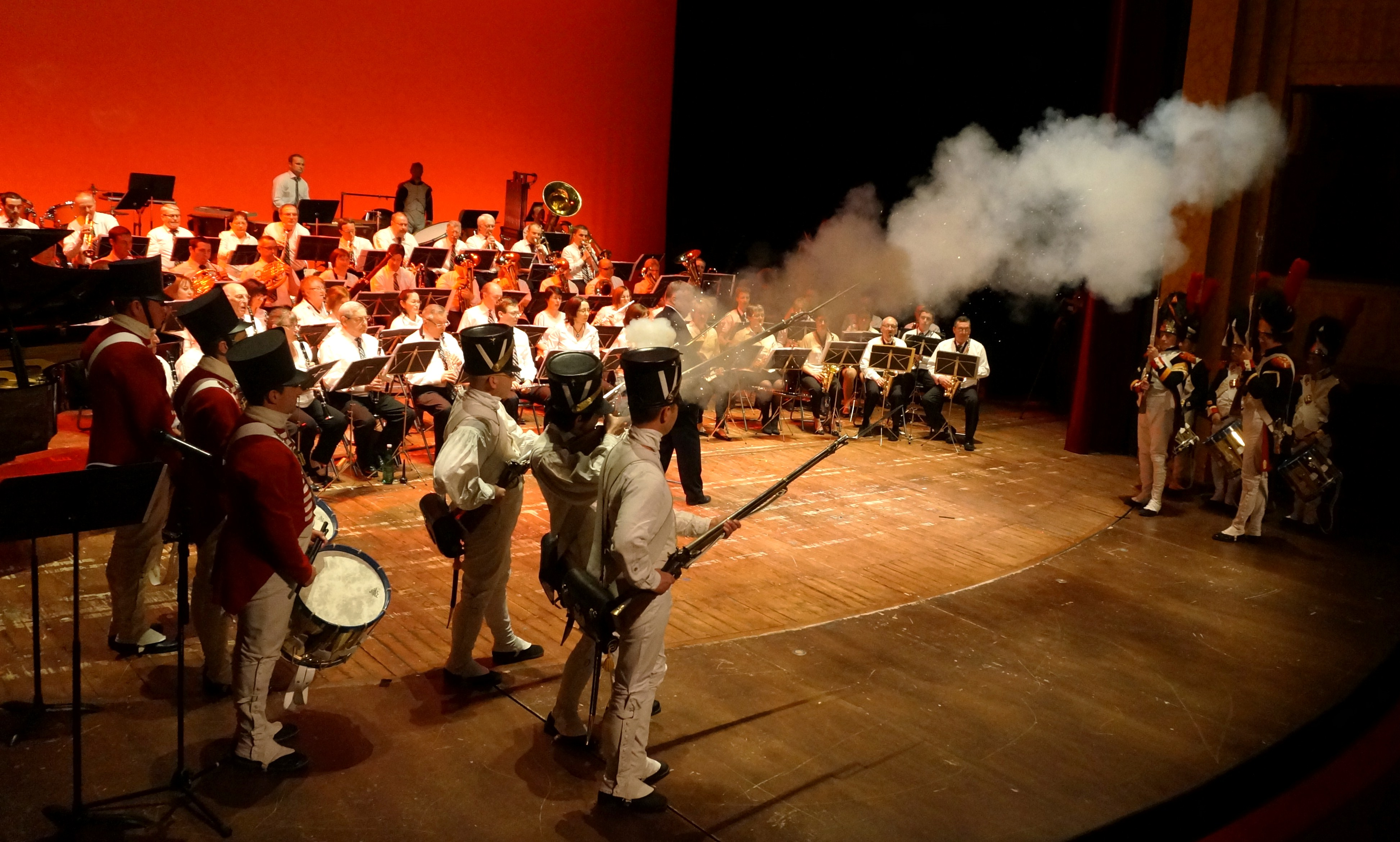 Lors de napoléon à Reims concert du bicentenaire.